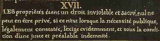 L'article 12 de la Déclaration des droits de l'homme et du citoyen de 1789 assurant la propriété privée. Source : Musée Carnavalet Pas de droit sur la DDHC je pense ... ce serai un comble